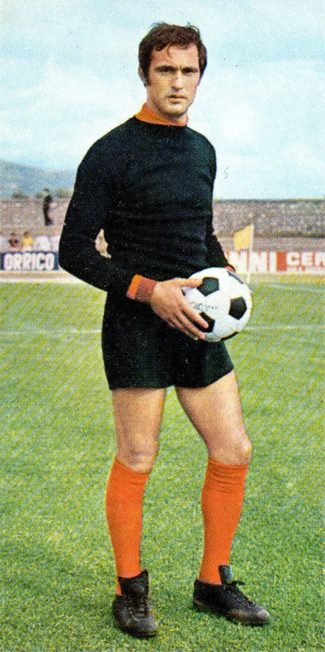 Il portiere di calcio italiano Alberto Ginulfi alla Roma all'inizio della stagione 1970-71.